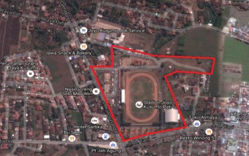 Denah Komplek Olahraga Joyokusumo